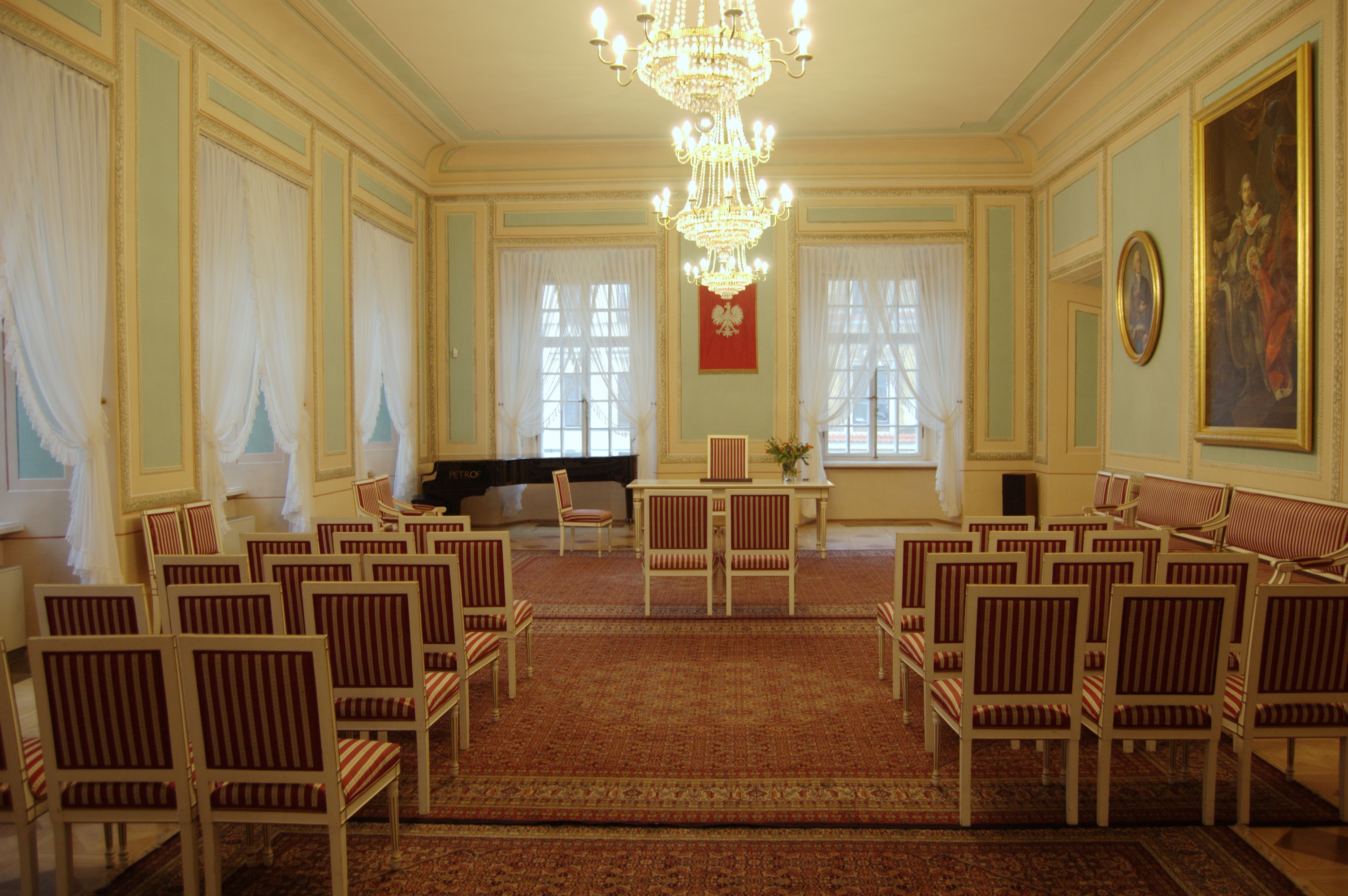 Sala Ślubów w lubelskim Trybunale Koronnym.